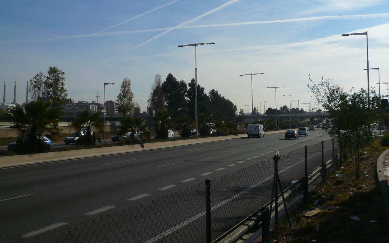 Ronda Litoral prop de la Verneda, Barcelona